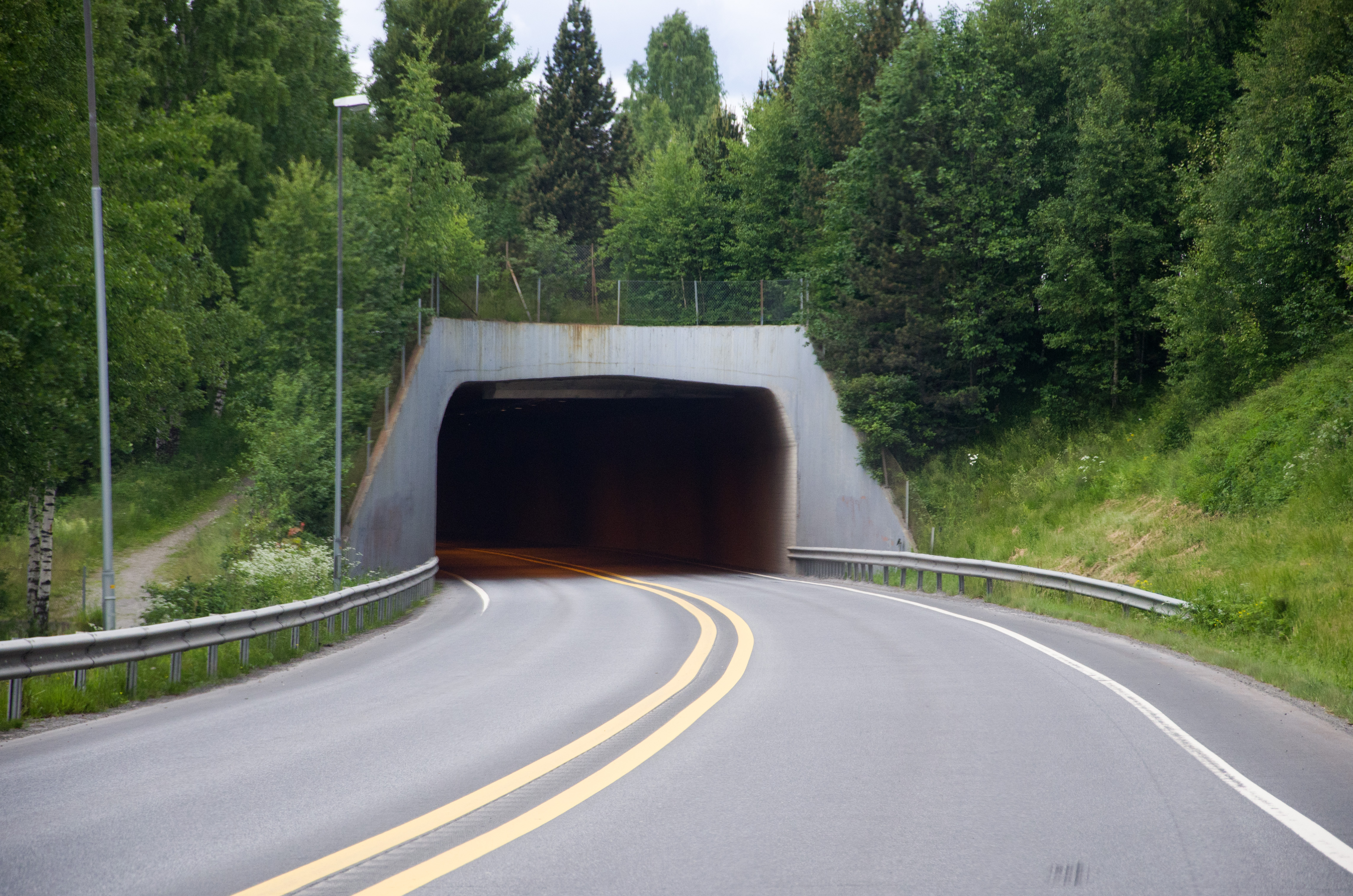 Mosoddentunnelen på E6 i Oppland